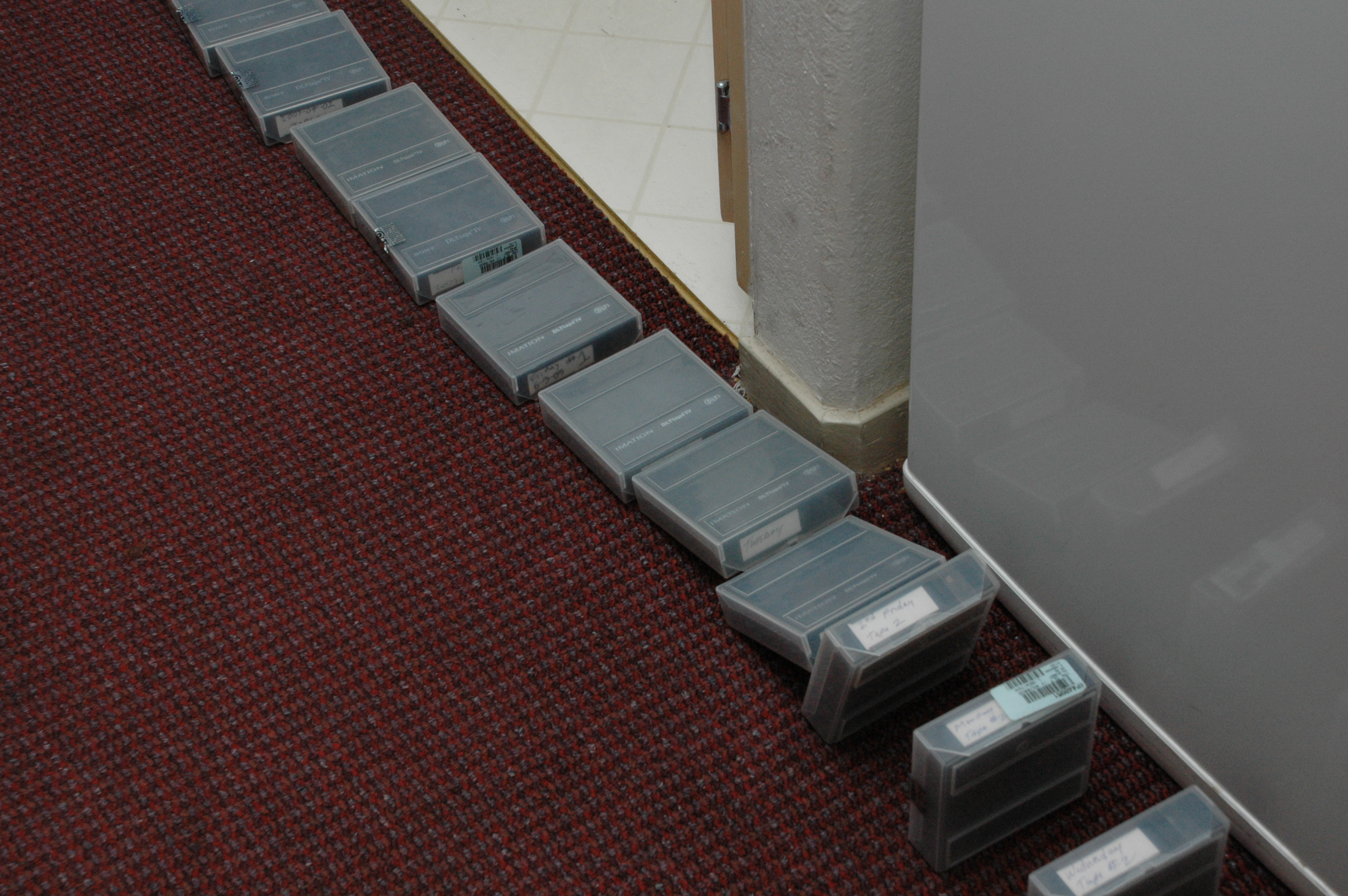 DLT Tape Dominoes